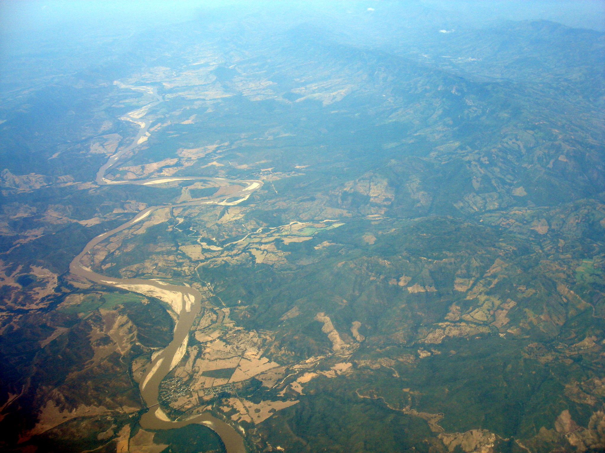 rio magdalena sector cundinamarca tolima verano 2010